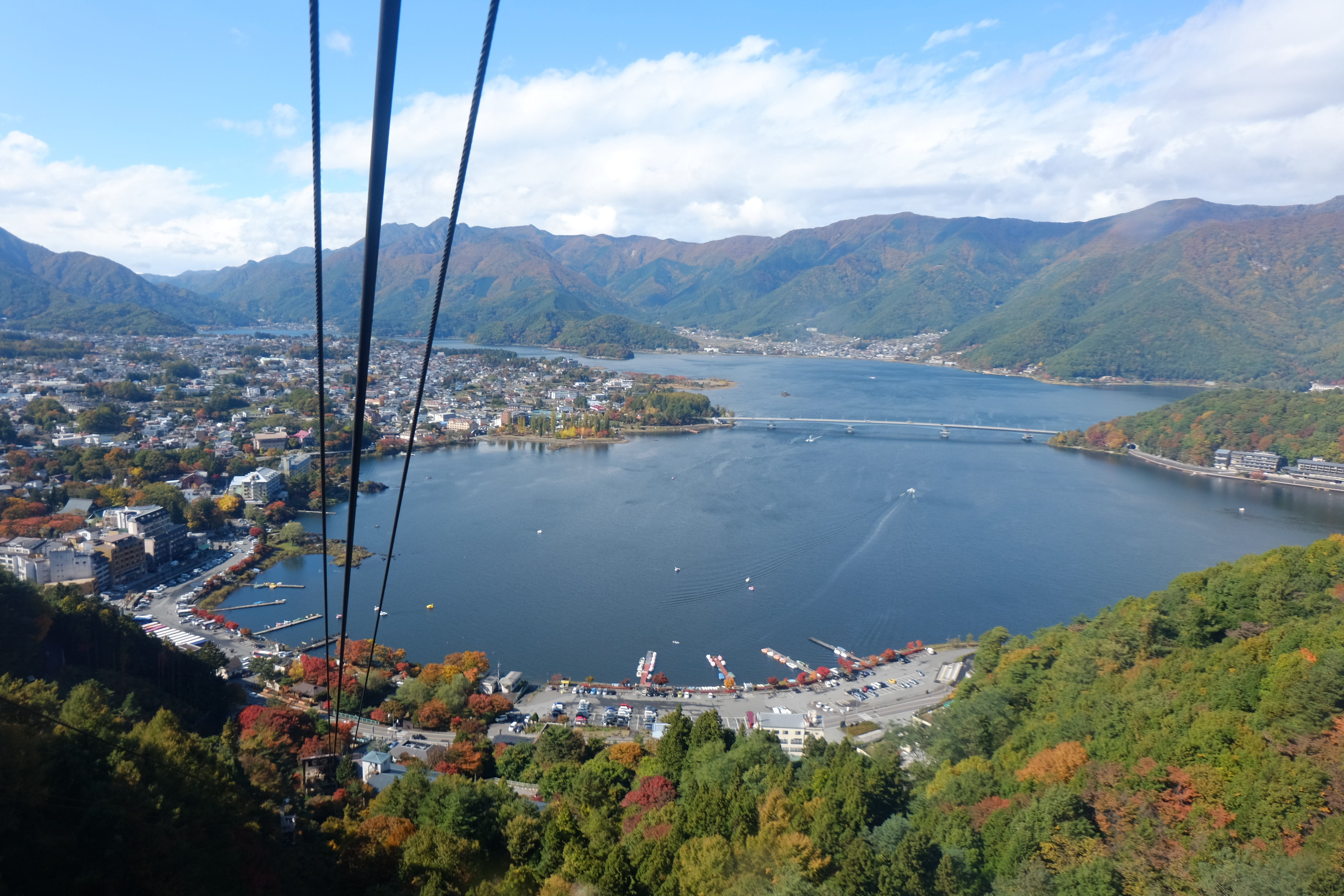 かちかち山ロープウェイからの眺望